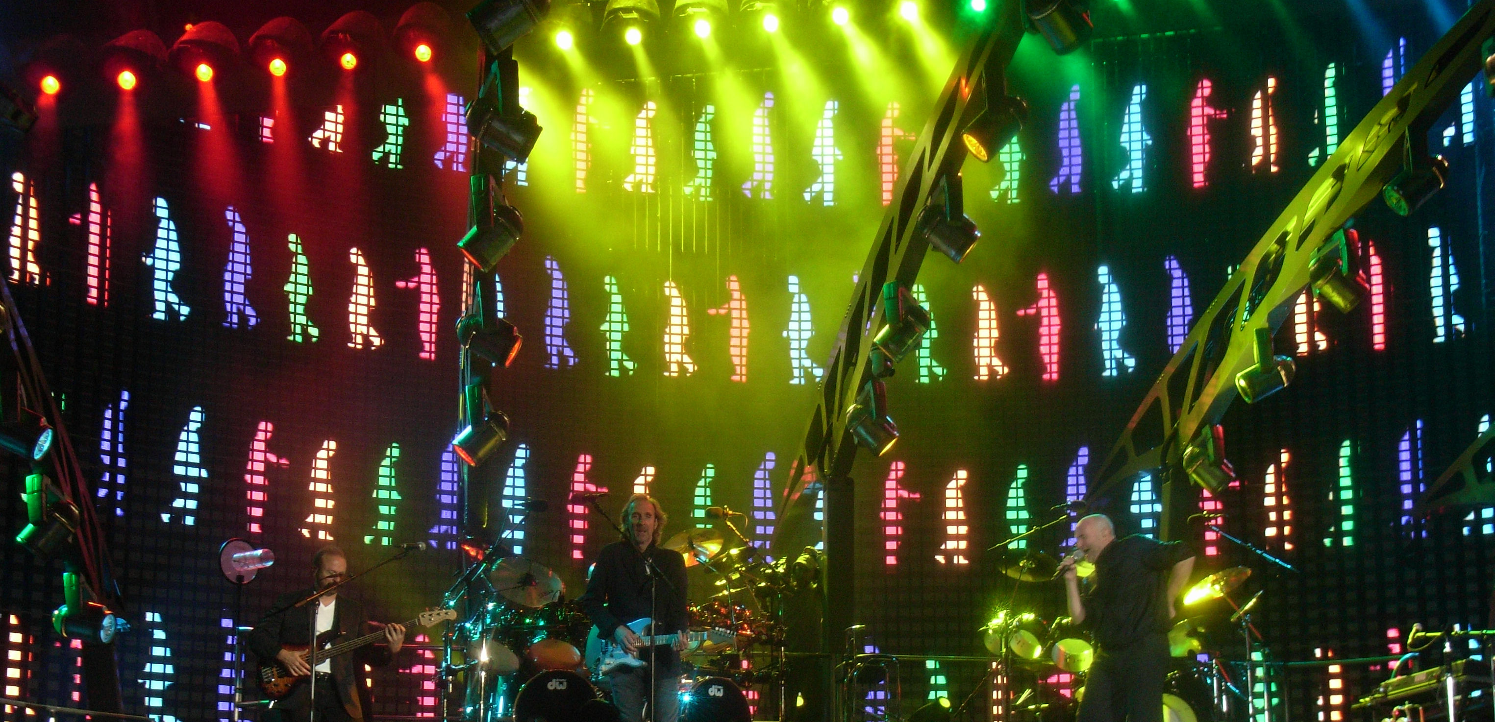 Video Screen